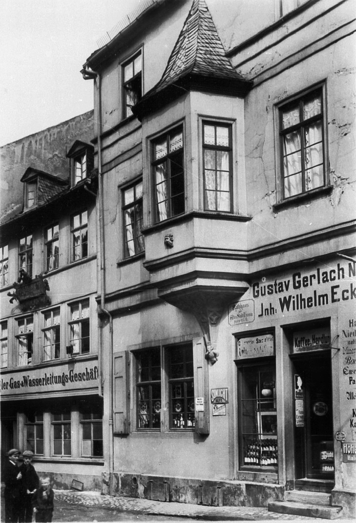 Metzgerstraße/Ecke Altstädter Markt. Ältestes Rathaus der Stadt Hanau 1484 - 1531